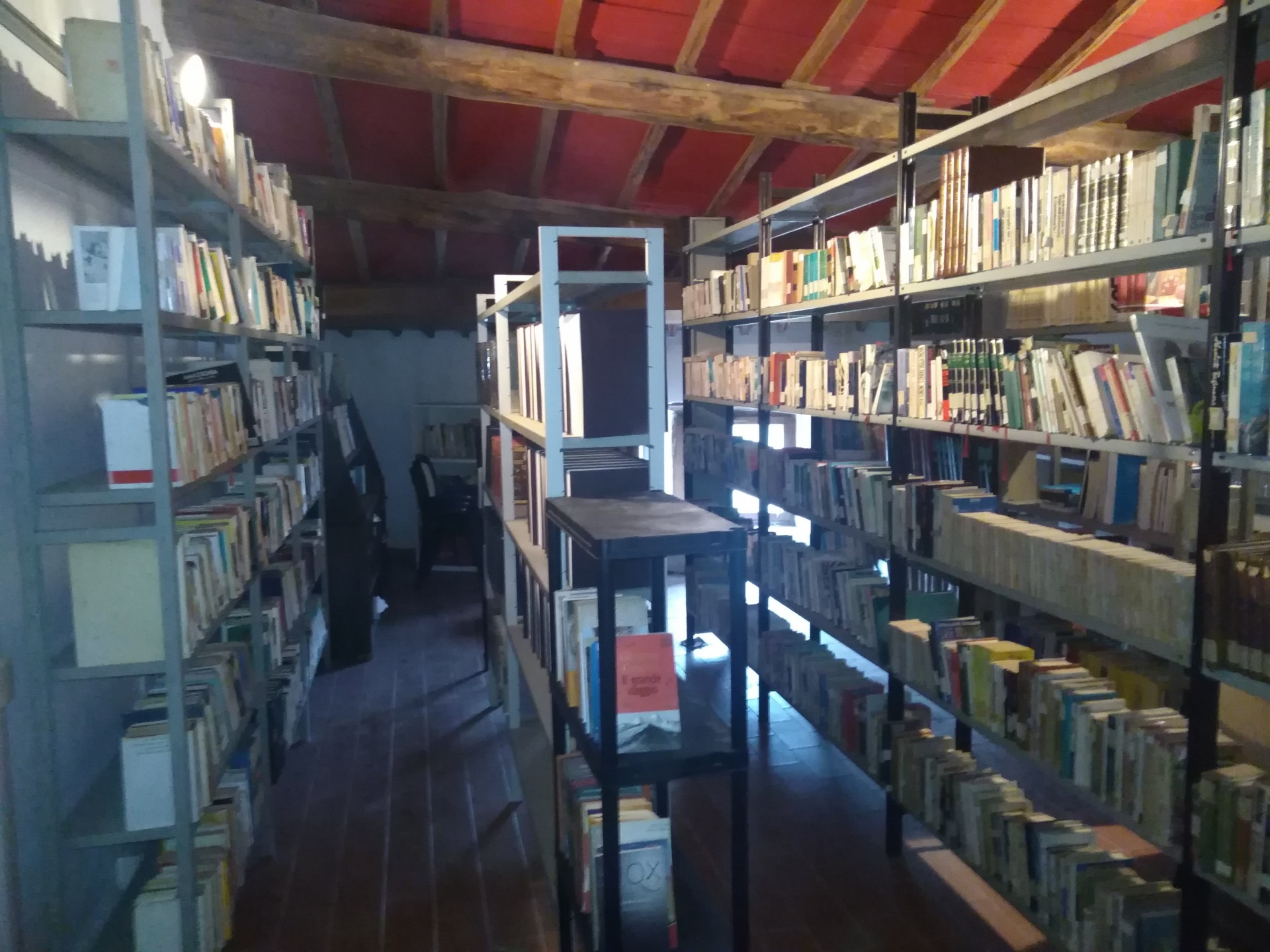 La biblioteca comunale, che in questi ultimi anni è stata dislocata al secondo piano di Palazzo Farnese, da giovedì 31/01/2019 torna disponibile. Sarà possibile usufruire dello spazio anche come centro di lettura e consultazione . L’obiettivo è quello di ampliare i servizi, come uno spazio ludoteca e un centro culturale . La biblioteca sarà aperta nei seguenti orari: Lunedi 8:00 - 14:00 Martedi 8:00 -17:00 Mercoledi 8:00 -14:00 Giovedi 8:00 - 17:00 Venerdi 8:00 - 14:00 Sabato 8:00 - 14:00